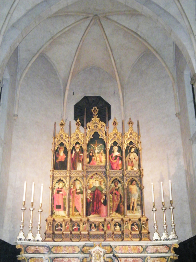 Polittico della Misericordia (attr. Antonio della Corna) - Chiesa S. Andrea - Asola This illustration was made by Luca Giarelli Use this work, but please always credit author's name in the immediate vicinity of the image. Example: Luca Giarelli / CC-BY-SA 3.0 A special thanks to... Questa immagine è opera di Luca Giarelli Usa quest'opera, ma ricordati di citare sempre l'autore nelle immediate vicinanze dell'immagine. Esempio: Luca Giarelli / CC-BY-SA 3.0 Un ringraziamento particolare a...